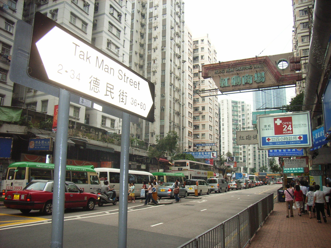 黃埔新邨區內的一條大街, 德民街 (User:Hung Yat).